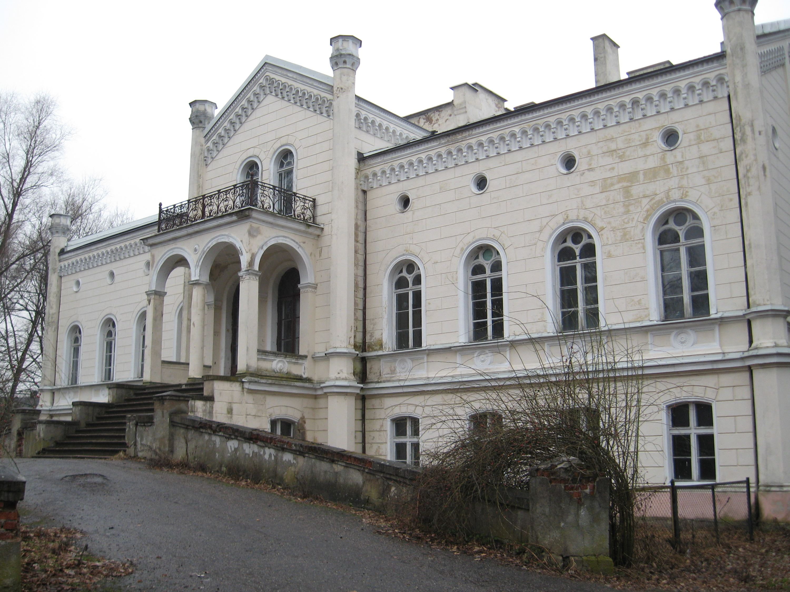 Das Gutshaus in Rodele